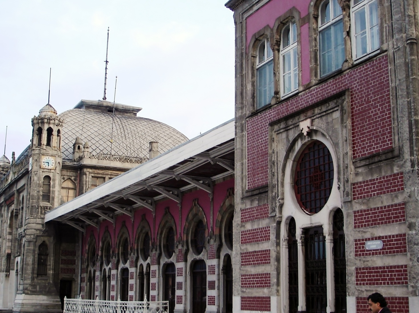 Sirkeci Bahnhof (Sirkeci Garı) / Sirkeci Railway Station (Sirkeci Garı) (Sirkeci, Istanbul/TR)